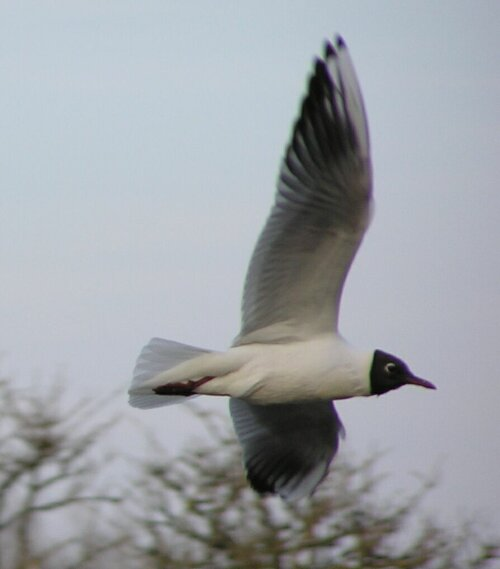 Larus ridibundus